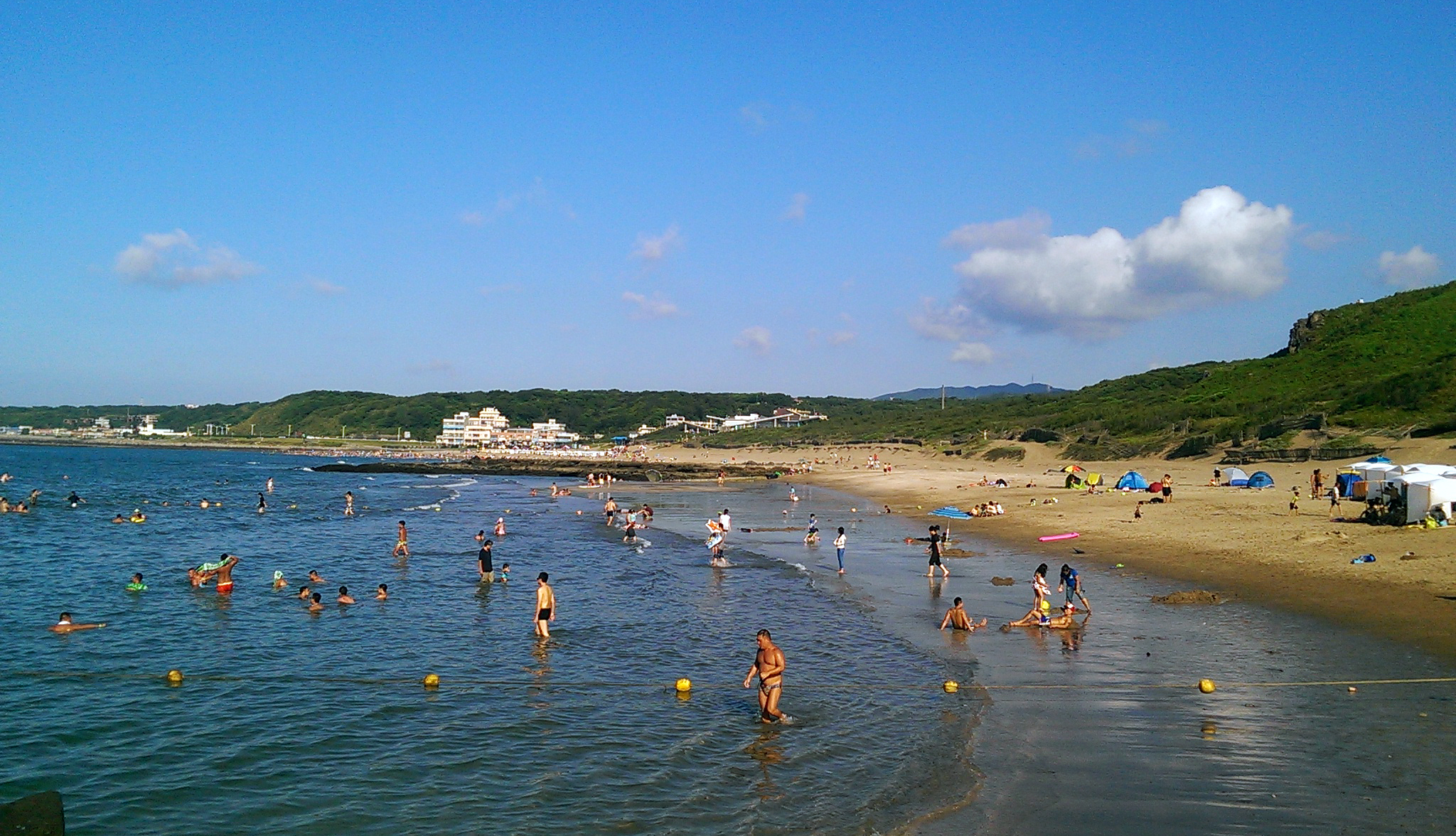 中文（台灣）: 新北市石門區白沙灣海水浴場